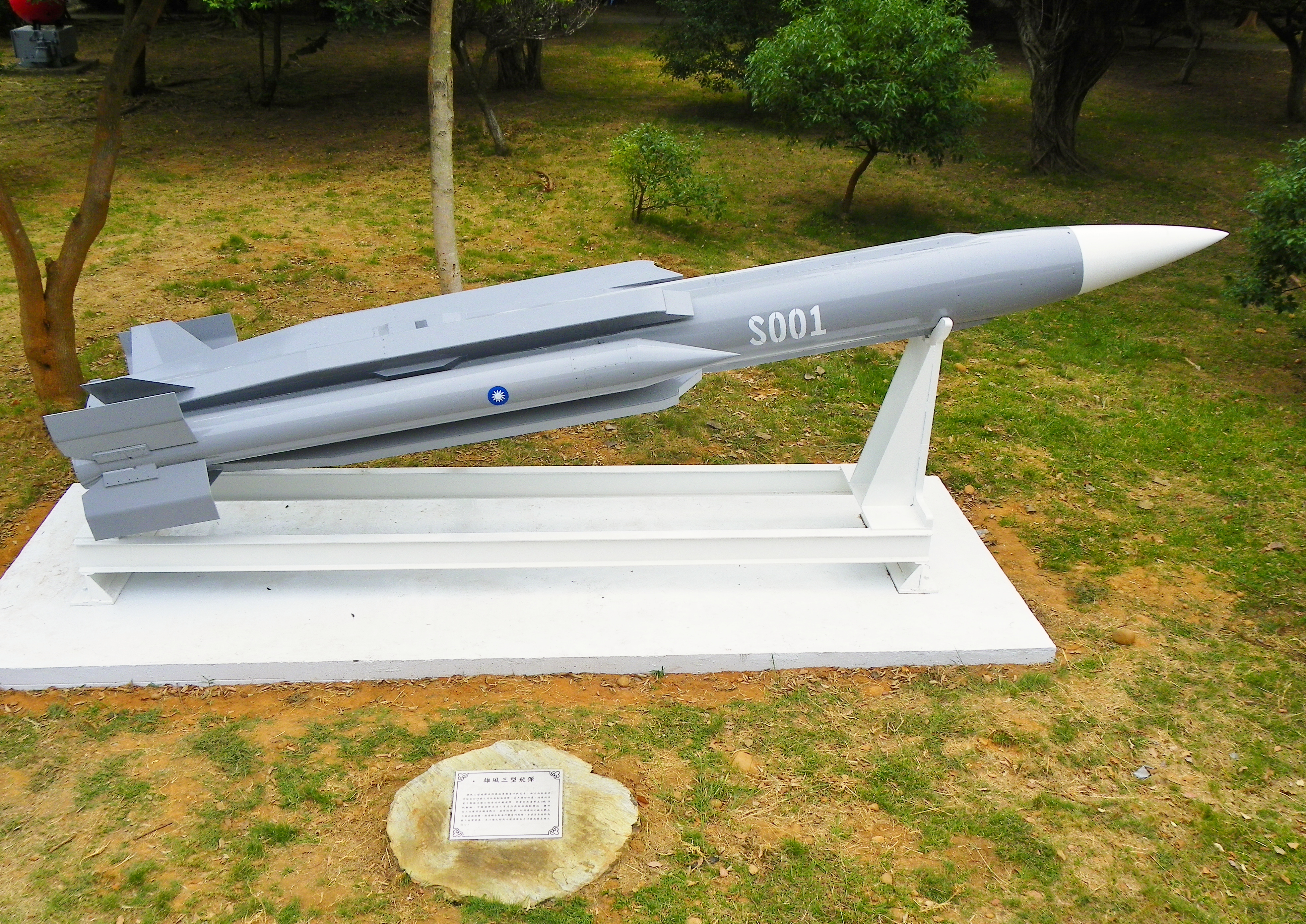 陳列於成功嶺的雄風三型反艦飛彈。